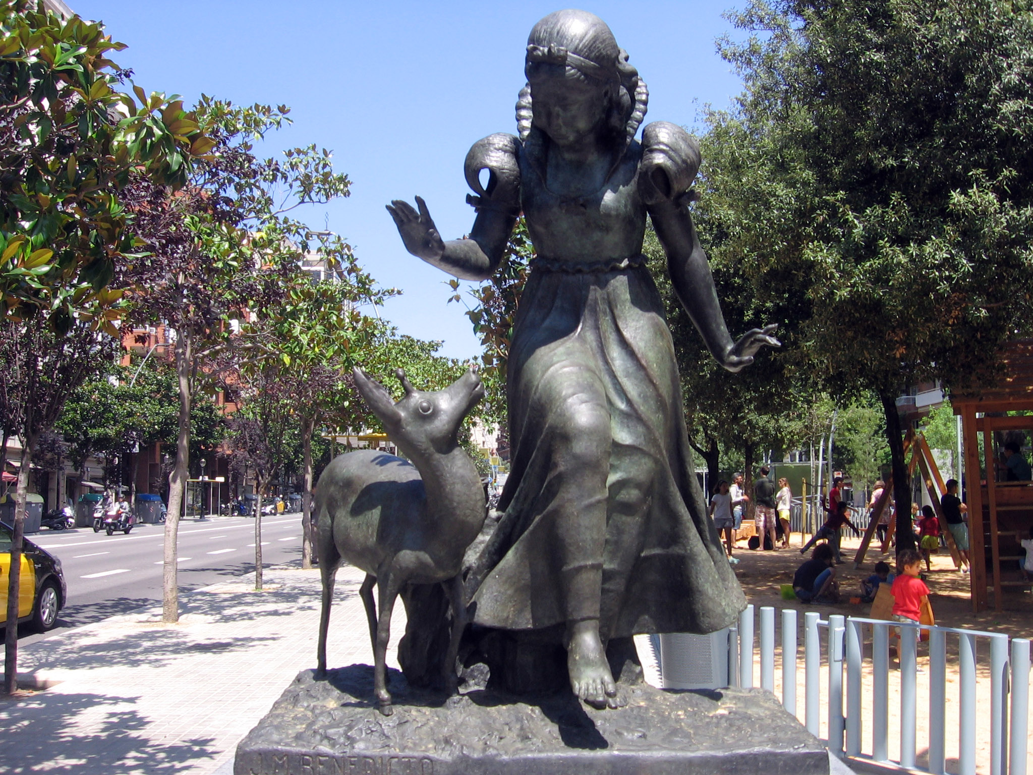 Fuente de Blancanieves (1947), de Josep Manuel Benedicto, plaza de Gala Placidia.